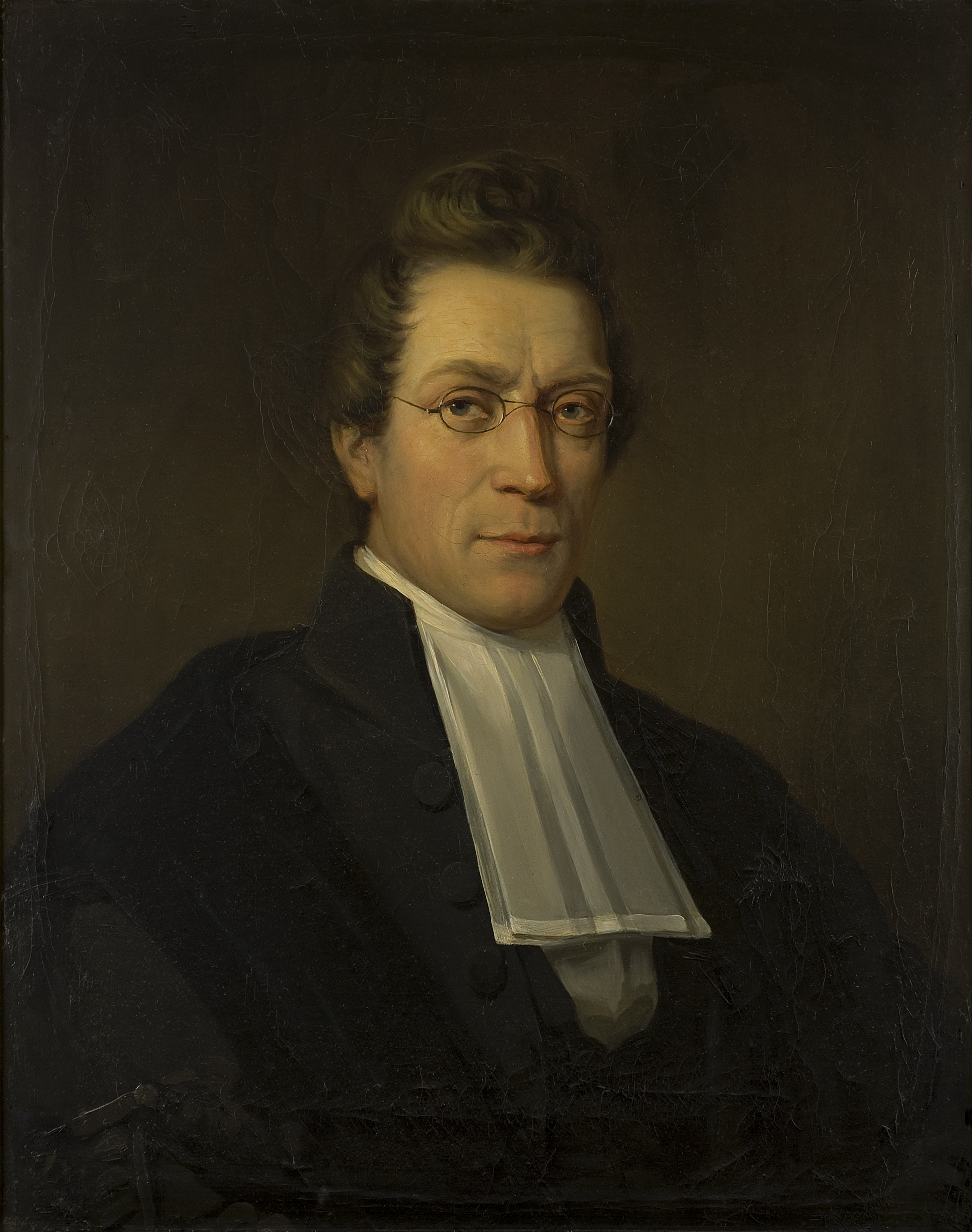 Josué Jean Philippe Valeton (1814-1906), hoogleraar in Groningen